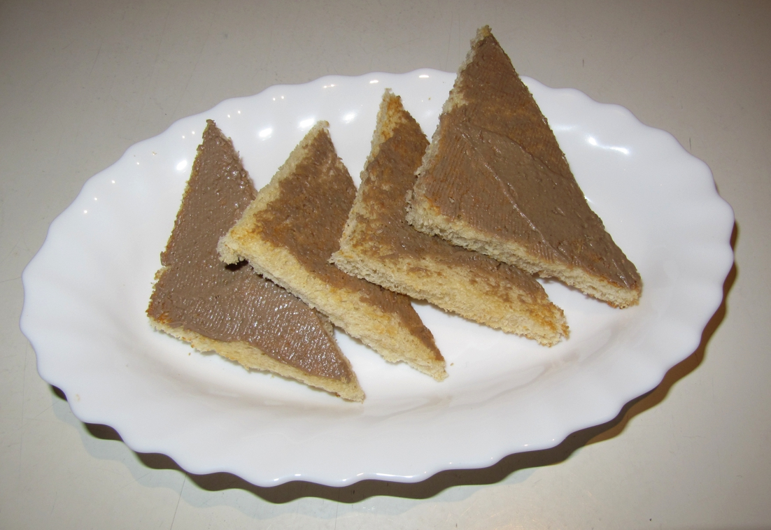 Vier Stücke Toast mit Gentleman’s Relish